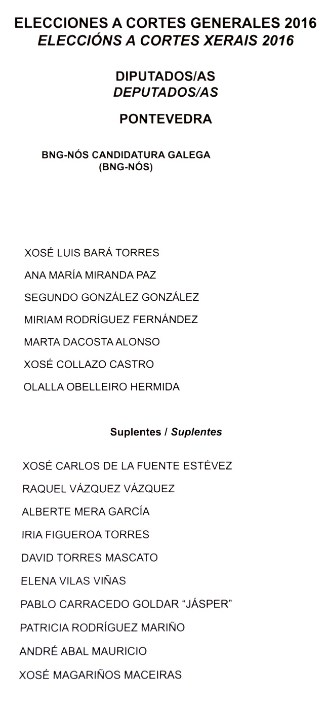 Papeletas electorales de las Elecciones a Cortes Generales de España de 2016, Provincia de Pontevedra.